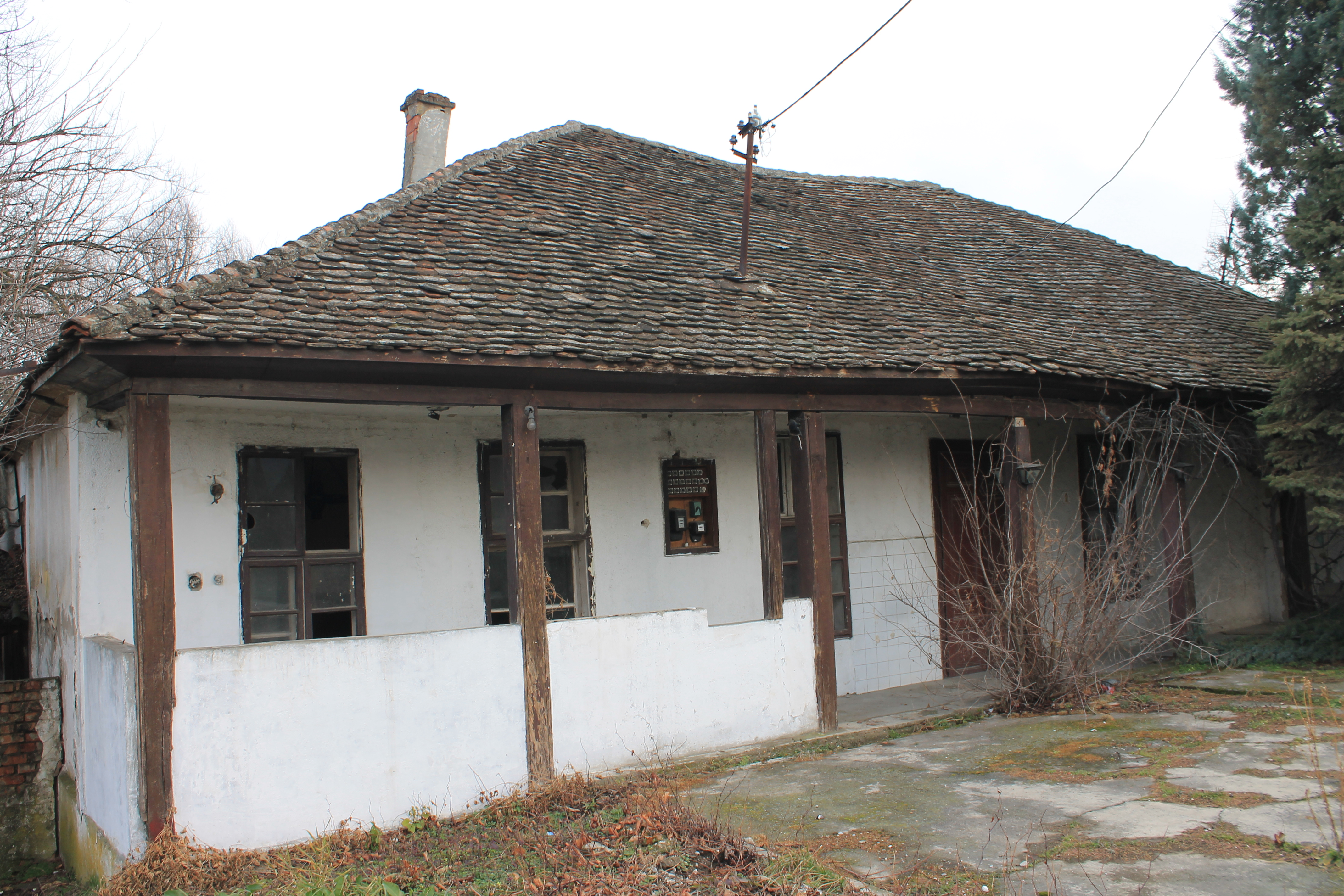 Mehana Uzun Mirka Apostolovića